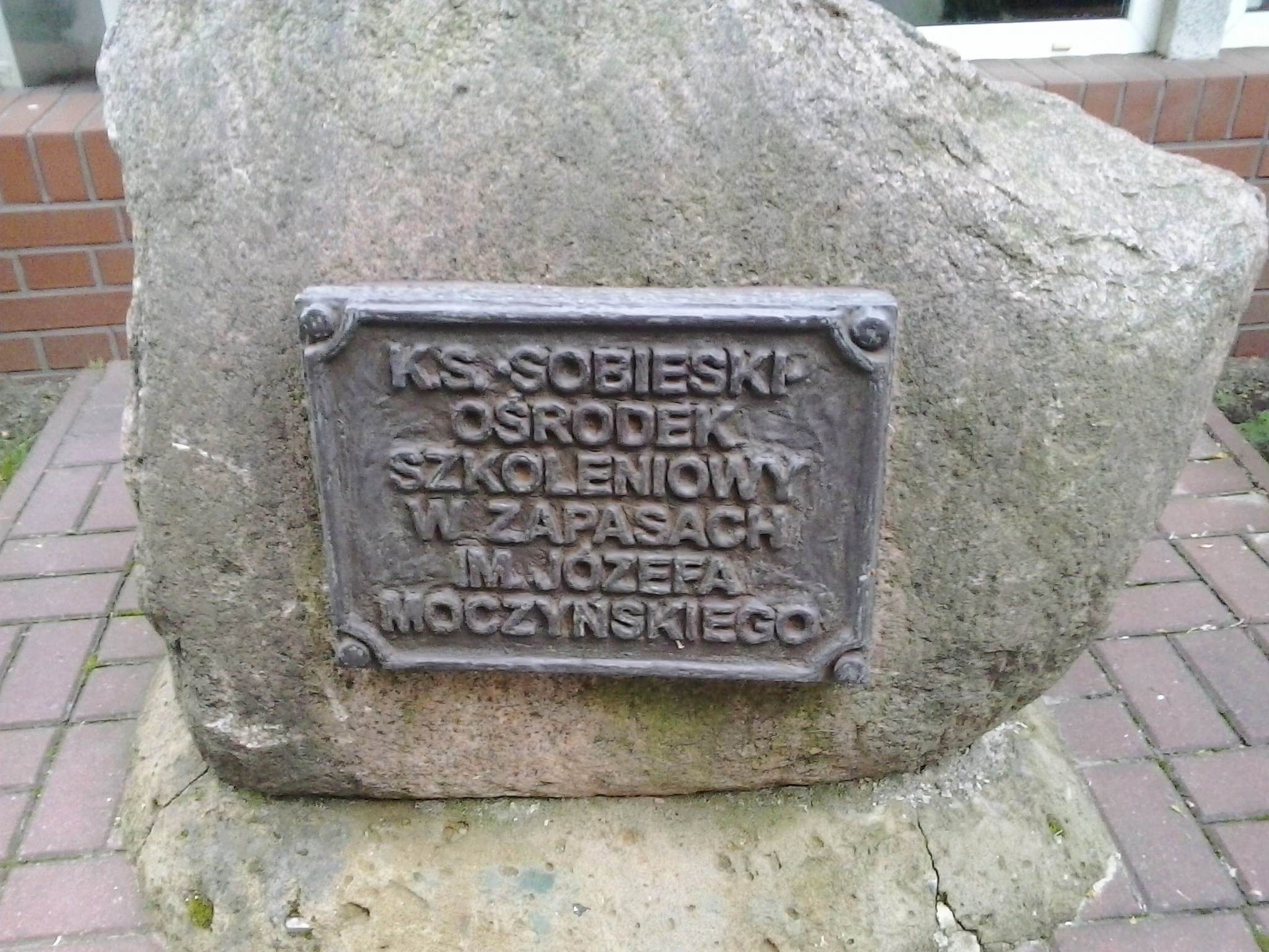 Kamień pamiątkowy na os. Jana III Sobieskiego w Poznaniu.